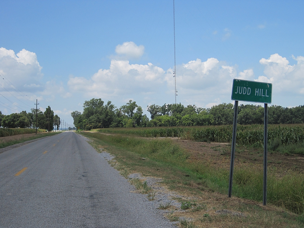 Judd Hill, Arkansas